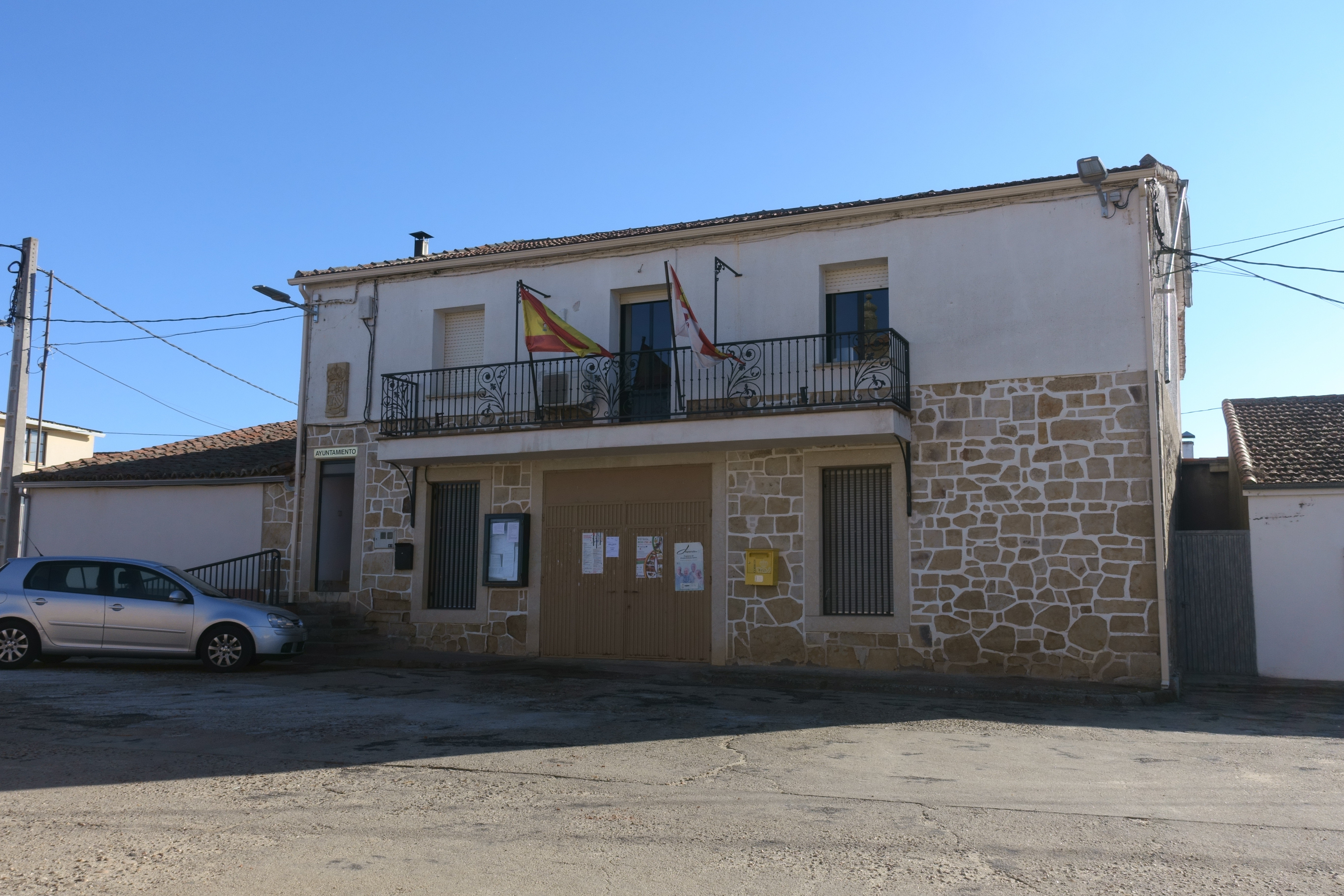 Casa consistorial de Cabrillas (Salamanca, España).